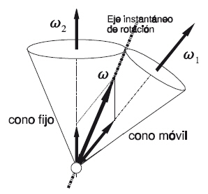 Cinemática del Sólido Rígido